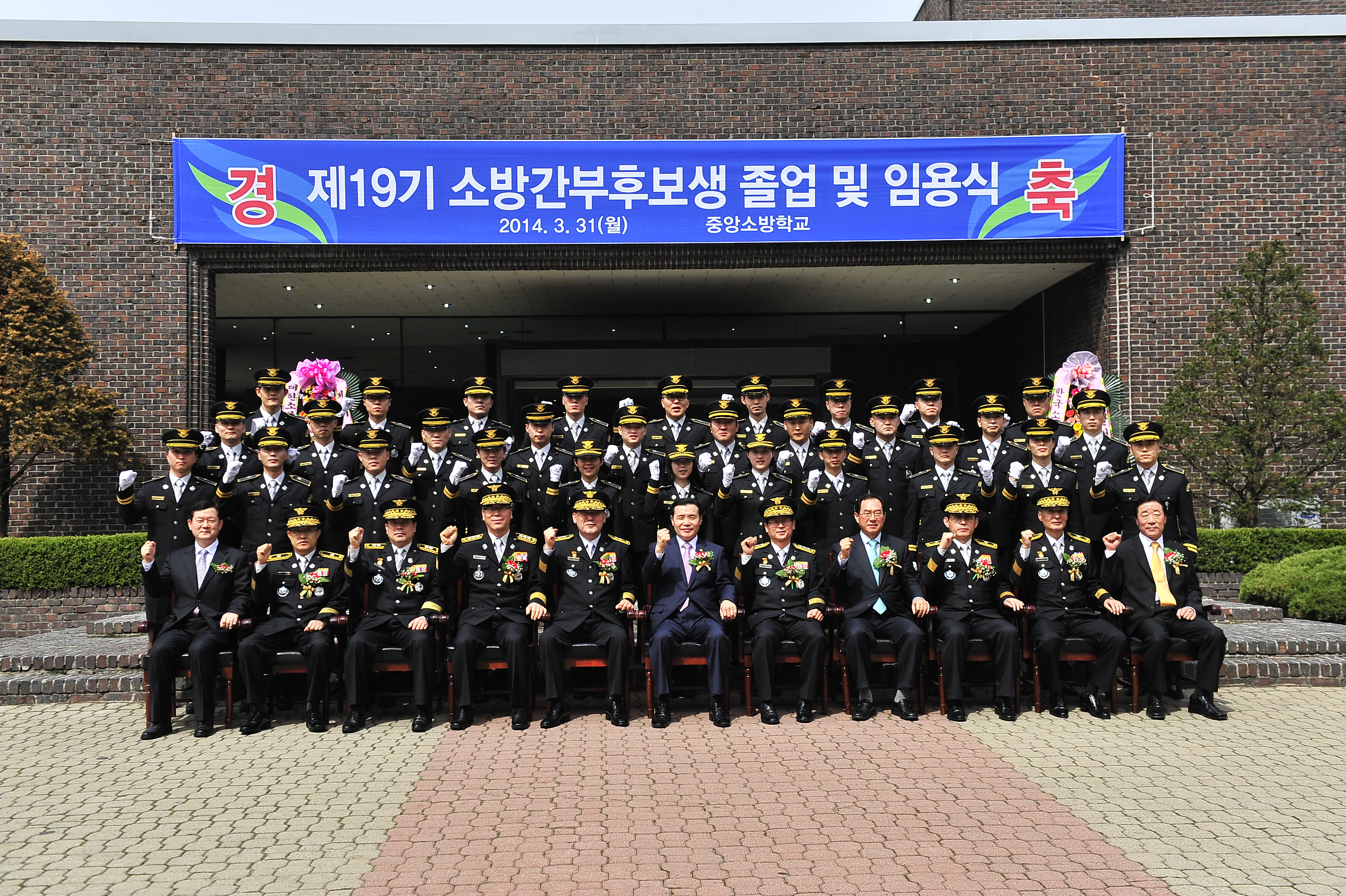 제19기 소방간부후보생 졸업식 사진